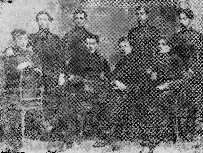 Członkowie organizacji "Promień" w I Gimnazjum w Rzeszowie w 1911 roku. Pierwszy z prawej Jan Tkaczow.